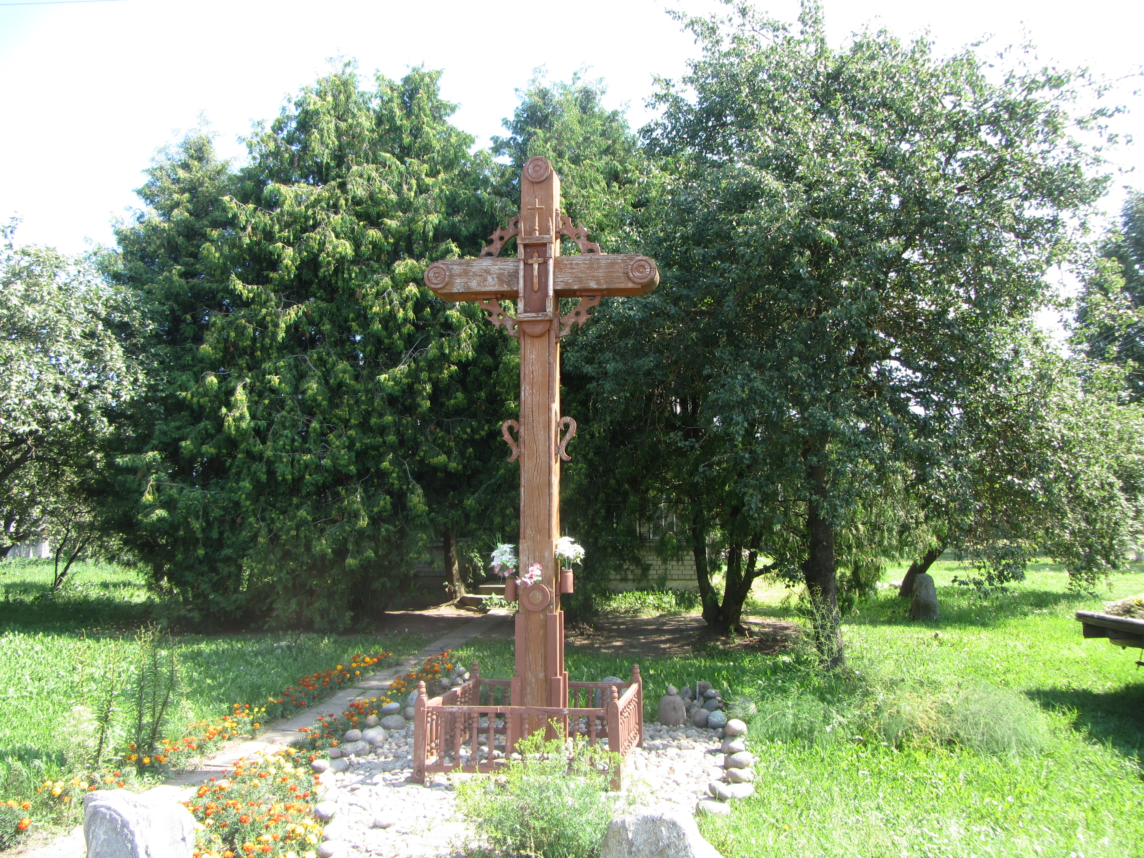 Aviliai II, Lithuania